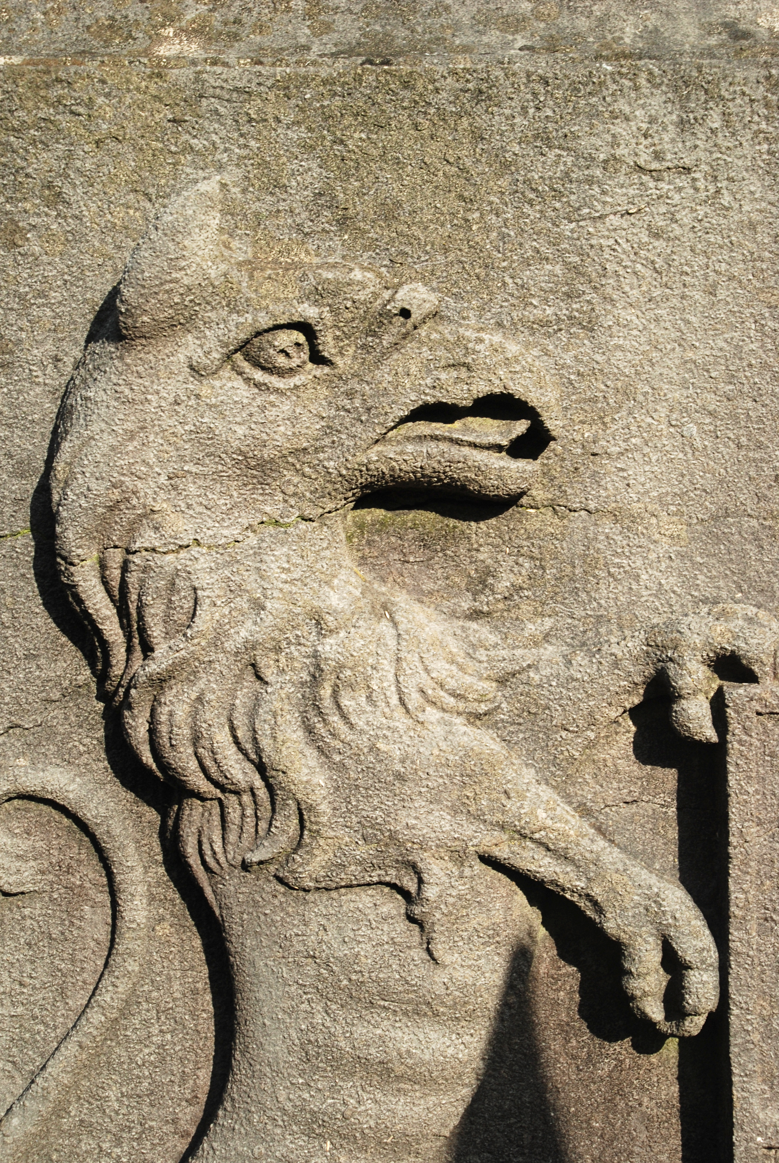 Belgique - Brabant wallon - Court-Saint-Étienne - Ancien cimetière paroissial